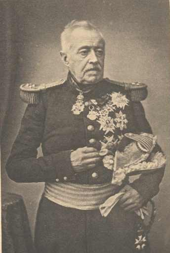 Maréchal de Castellane - Photographie circa 1860